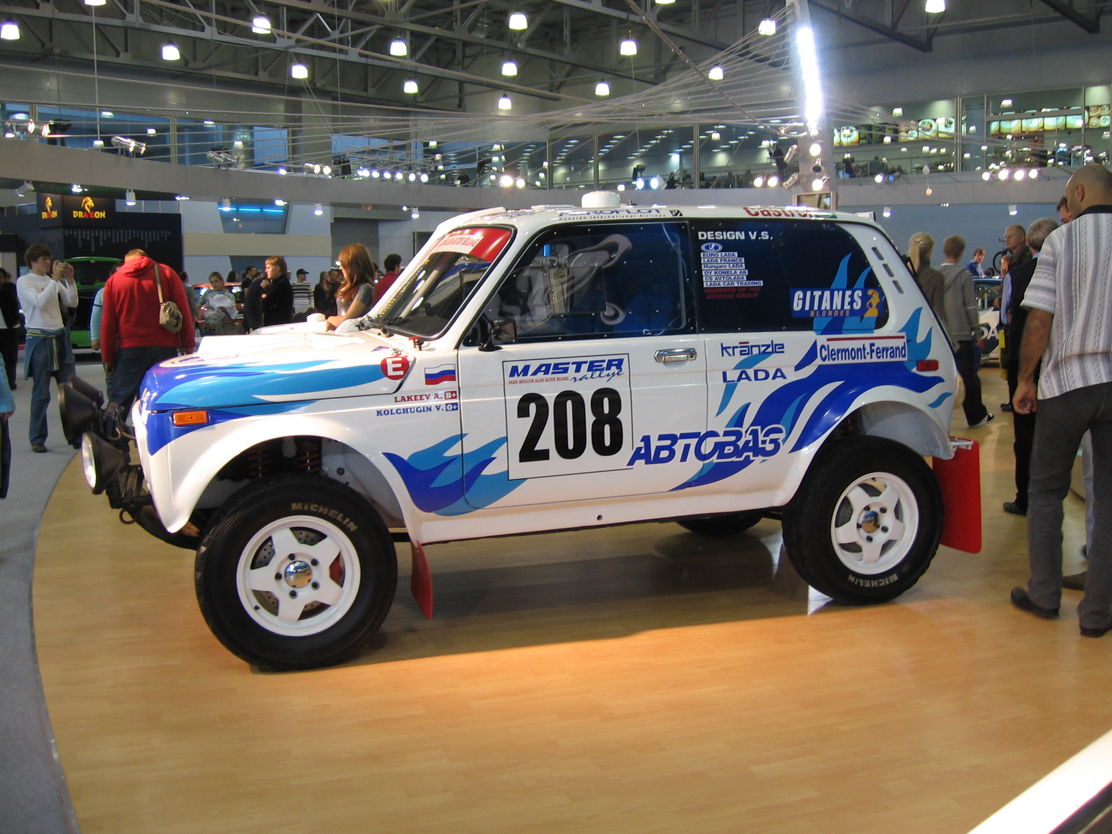 lada niva T3 rally mims